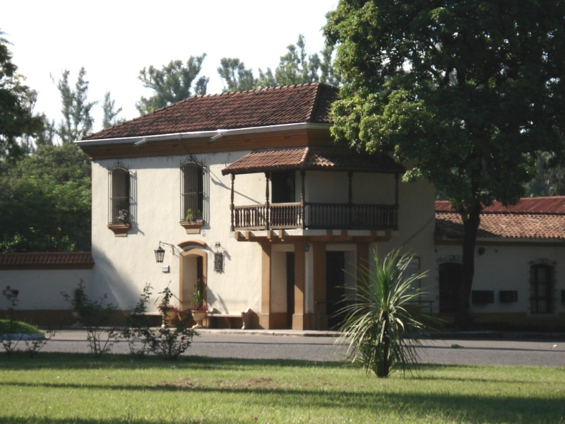 9 de Julio Park, Tucumán, Argentina